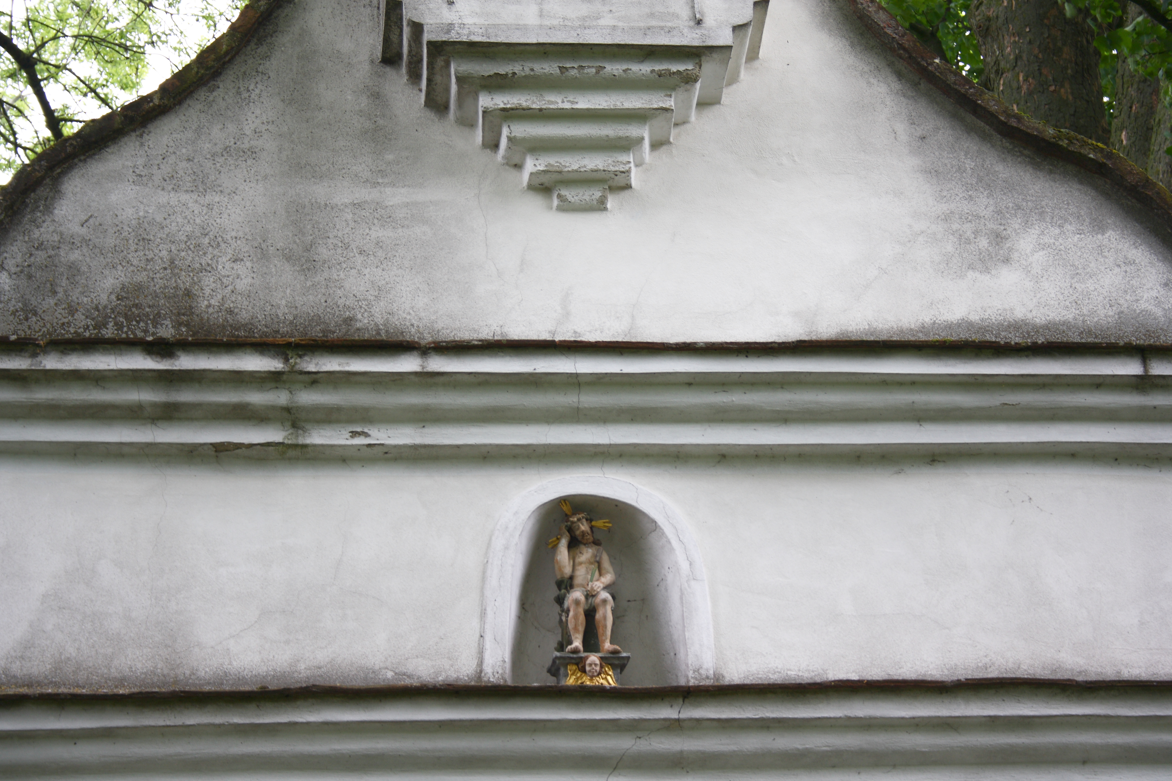 katholische Kapelle St. Antonius in Heudorf, einem Ortsteil von Glött im Landkreis Dillingen an der Donau (Bayern)